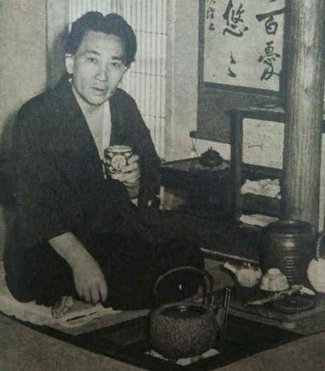 三島一声